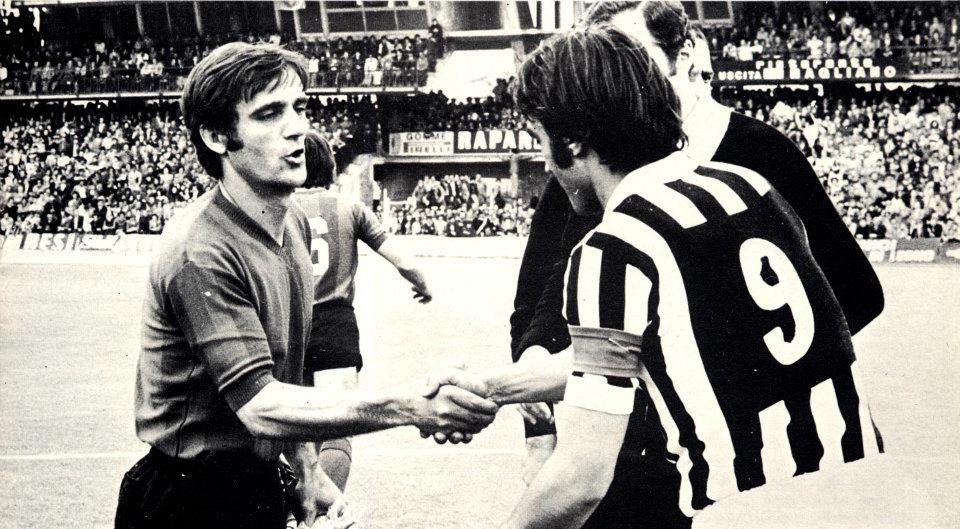 Terni (Italia), stadio Libero Liberati, 4 maggio 1975. Da sinistra: il capitano ternano Fernando Benatti e quello juventino Pietro Anastasi si salutano prima della sfida tra Ternana Calcio e Juventus F.C. (0-2) valevole per la 28ª giornata del campionato italiano di Serie A 1974-75.